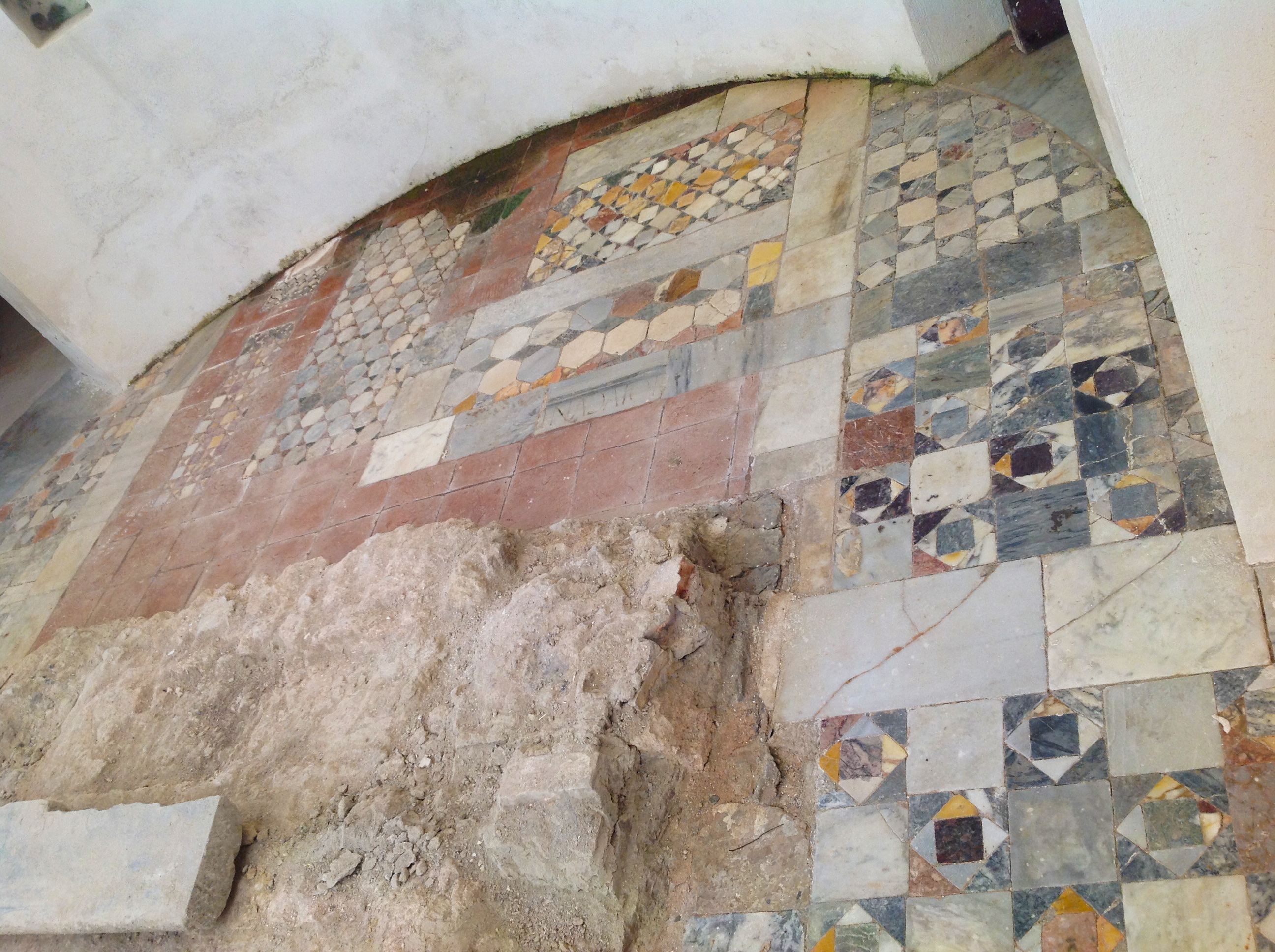 Pavimento dell'abside, realizzato negli anni 1980 accostando liberamente elementi cosmateschi.